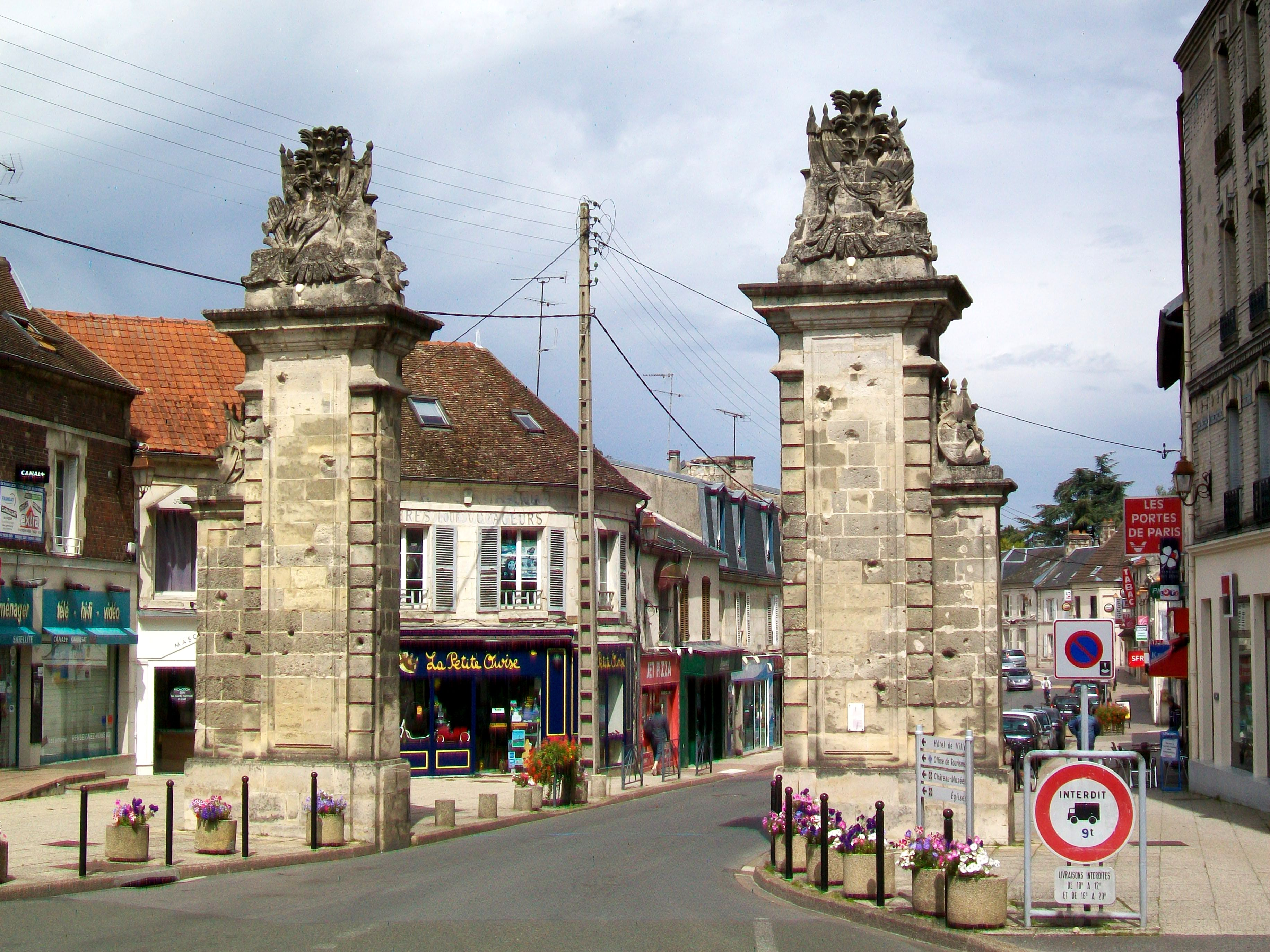 Les vestiges de la porte de Paris, dont la construction eut lieu entre 1788 et 1792 pour marquer le début de la nouvelle route pour Nanteuil-le-Haudouin et Paris, et qui ne fut jamais complètement achevée en raison de la Révolution. Deux colonnes à gauche et à droite ont été détruites.